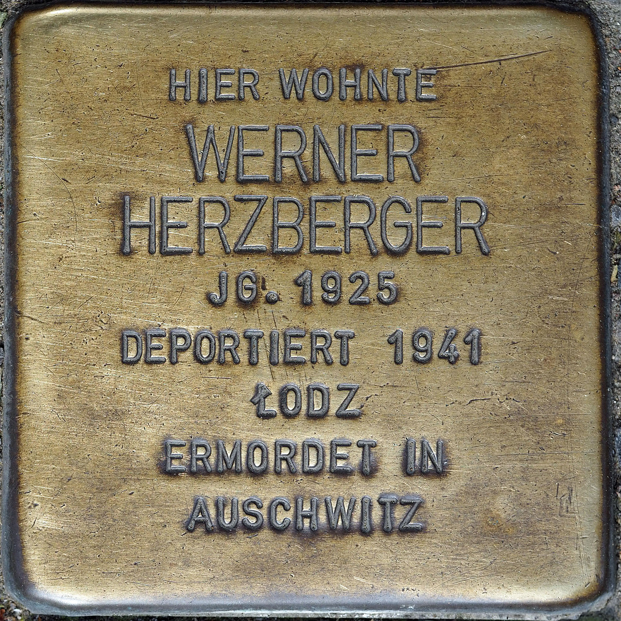 Stolpersteine MG: Herzberger, Werner